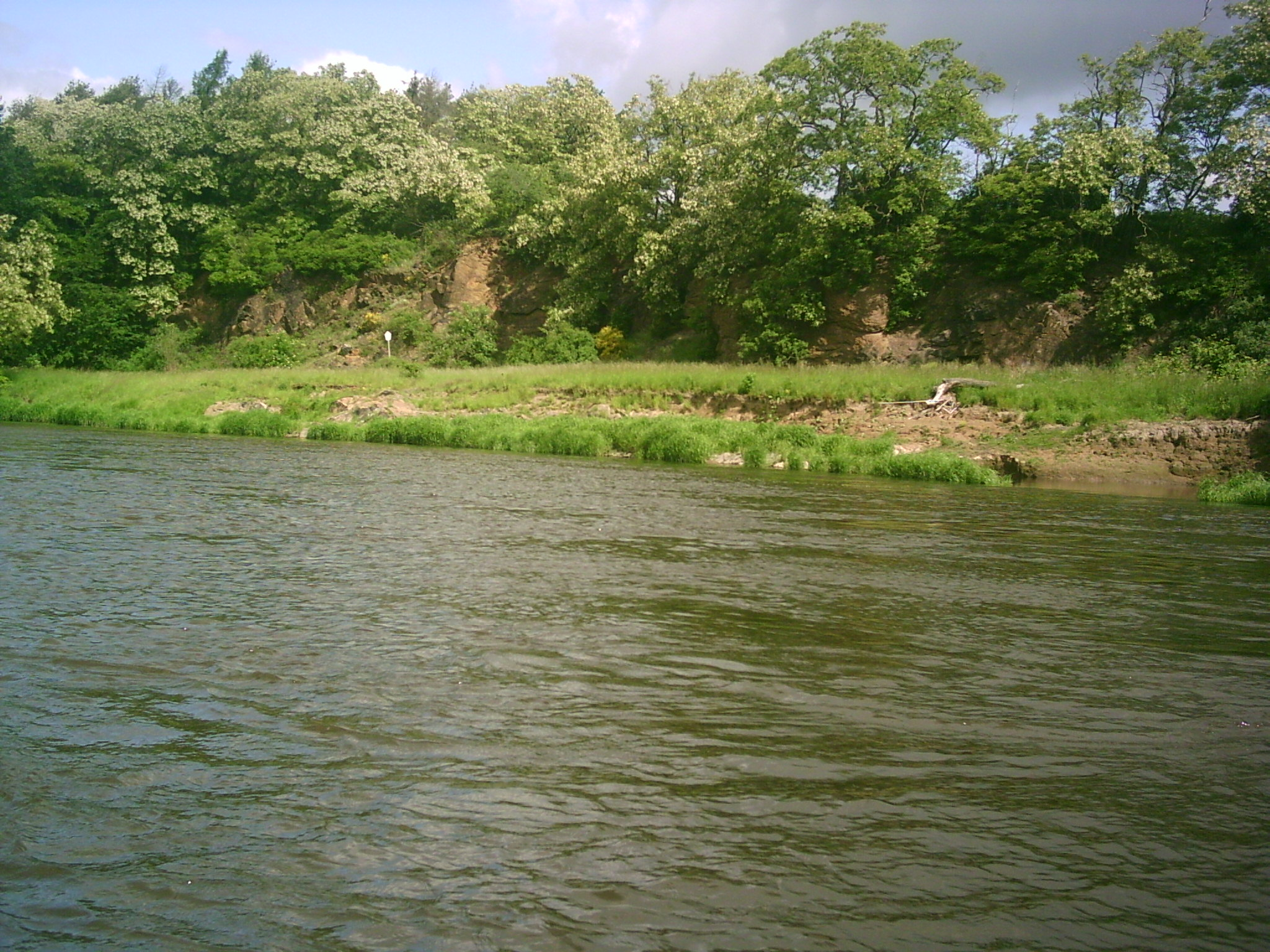 The river Mulde near Oelschütz